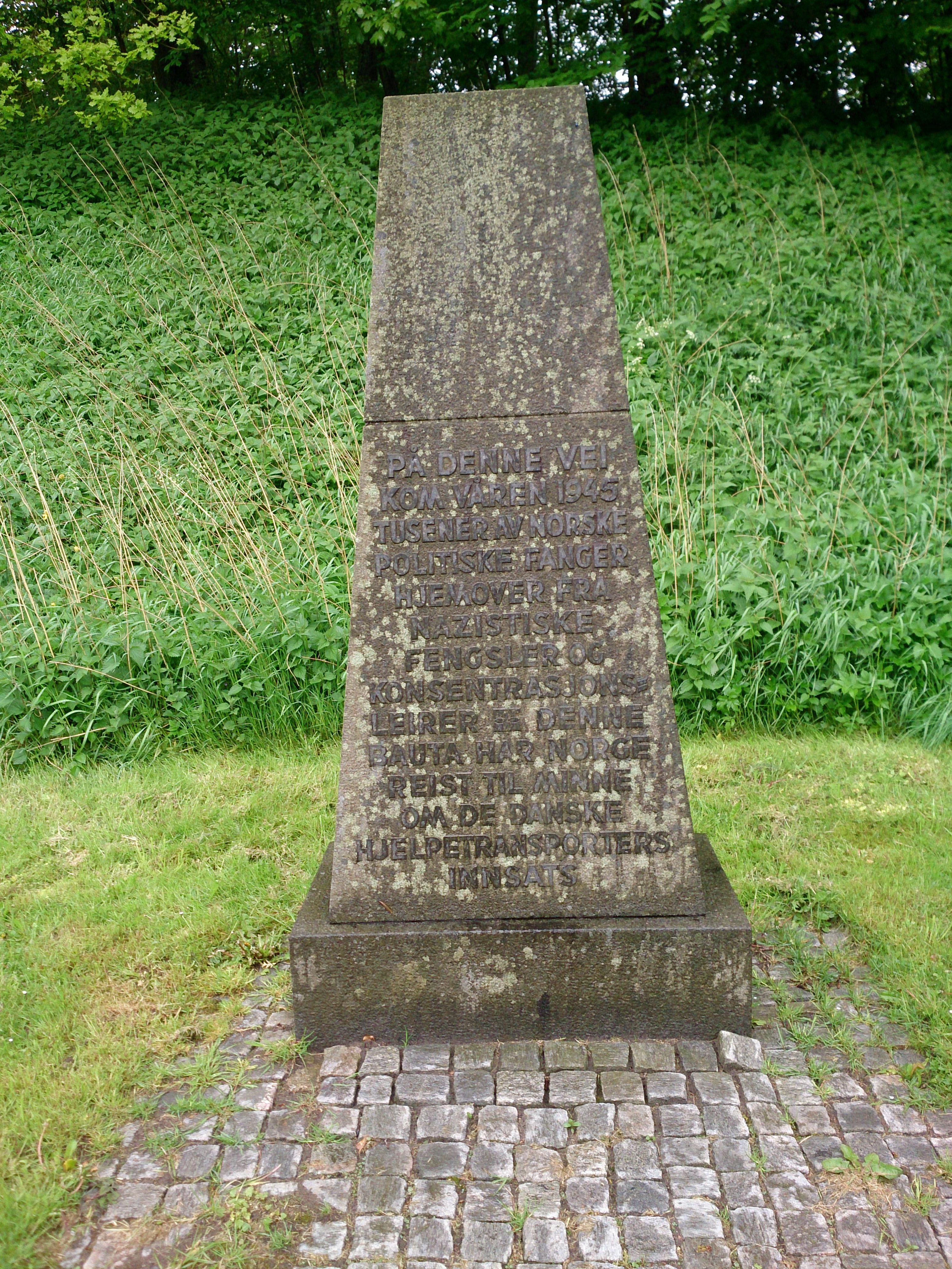 Auf diesem Weg kamen 1945 Tausende von norwegischen politischen Gefangenen aus nationalsozialistischen Gefängnissen und Konzentrationslagern nach Hause. Zur Erinnerung an diese dänischen Rettungstransporte hat Norwegen dieses Denkmal errichtet.